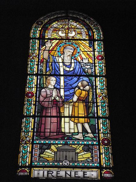 Vitrail de Saint-Irénée par Bégule (Eglise St-Pothin de Lyon)